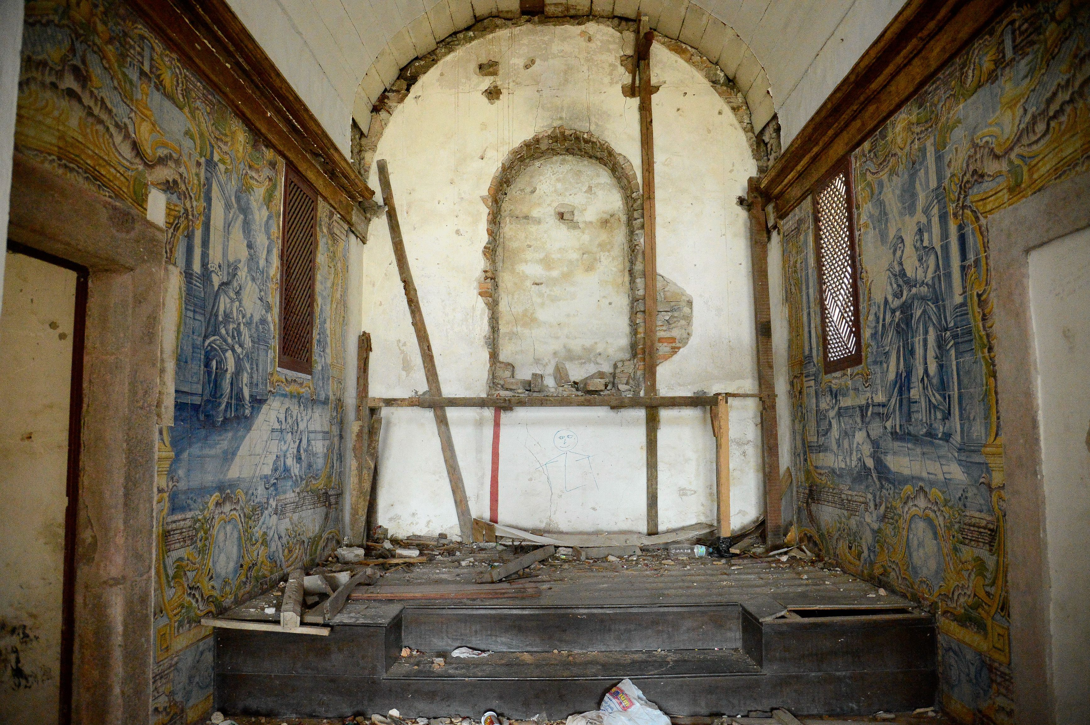 São Gonçalo (RJ) - Marco da arquitetura colonial brasileira, a Fazenda Colubandê encontra-se degradada. No fim de janeiro, as portas da fazenda foram roubadas e os ladrões desmontaram o retábulo da capela da Sant'Anna, de 1740. Em função disso, a Justiça Federal, a pedido do MPF, determinou que o governo do estado e o Iphan assumam a administração e a recuperação do local.